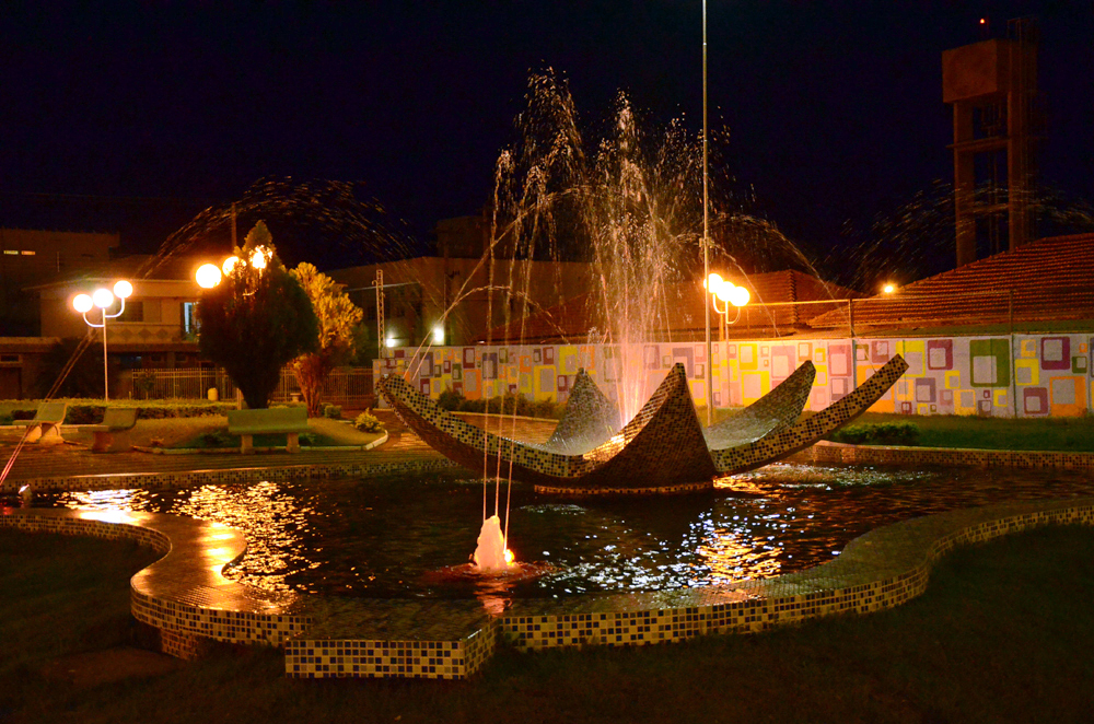 Praça Carlos Kato na Estância Turística de Pereira Barreto.jpg